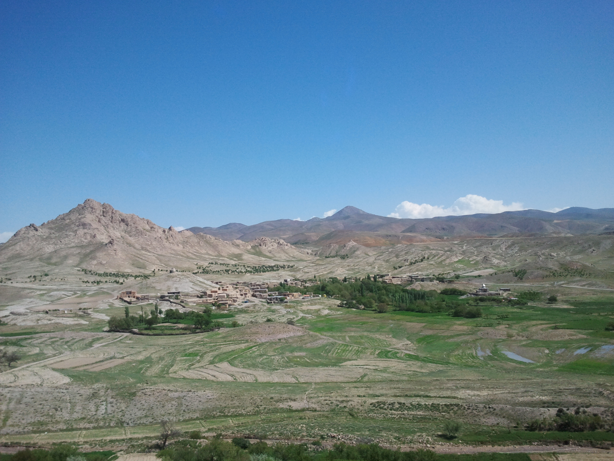 روستای آق قایه ودورنمای کوه زیبای چاقل«چهل دختر»